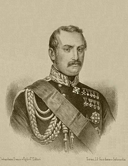 "Ritratto di Giovanni Durando", litografia